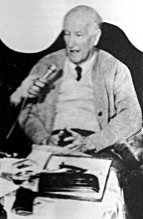 Vicente Aleixandre, escritor español